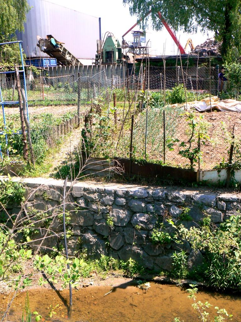 Črnušnica v industrijskem območju